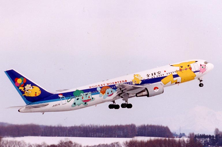 全日空 ボーイング767-381 (JA8578) ポケモンジェット98